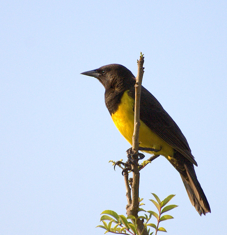 Pseudoleistes guirahuro Piraju-SP - Estrada de terra Piraju / Sarutaiá , próximo à cachoeira na Neblina...